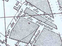 Détail d'un plan du XIVème arrondissement de Paris en 1860. On y distingue la rue du Géorama aujourd'hui rue Maurice-Ripoche et la rue du Château du Maine aujourd'hui rue du Château.